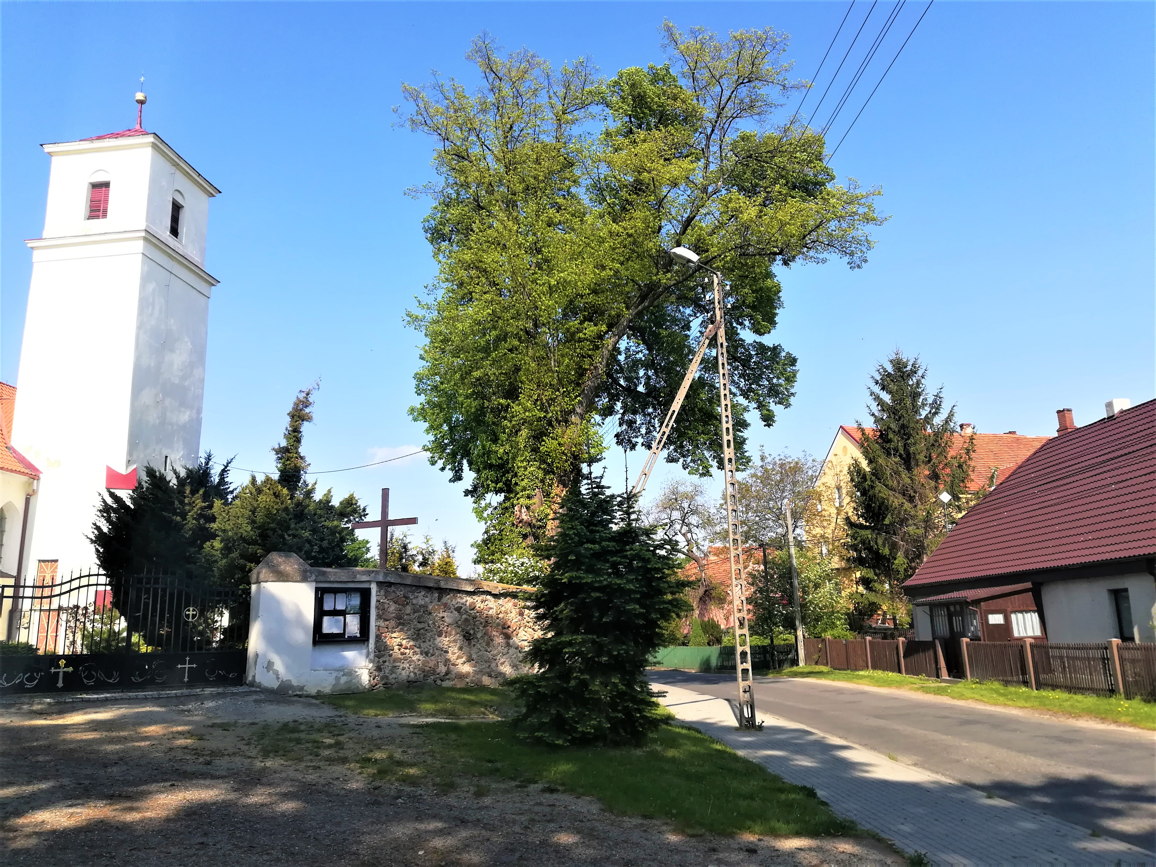 Milikowice - fragm. wsi.